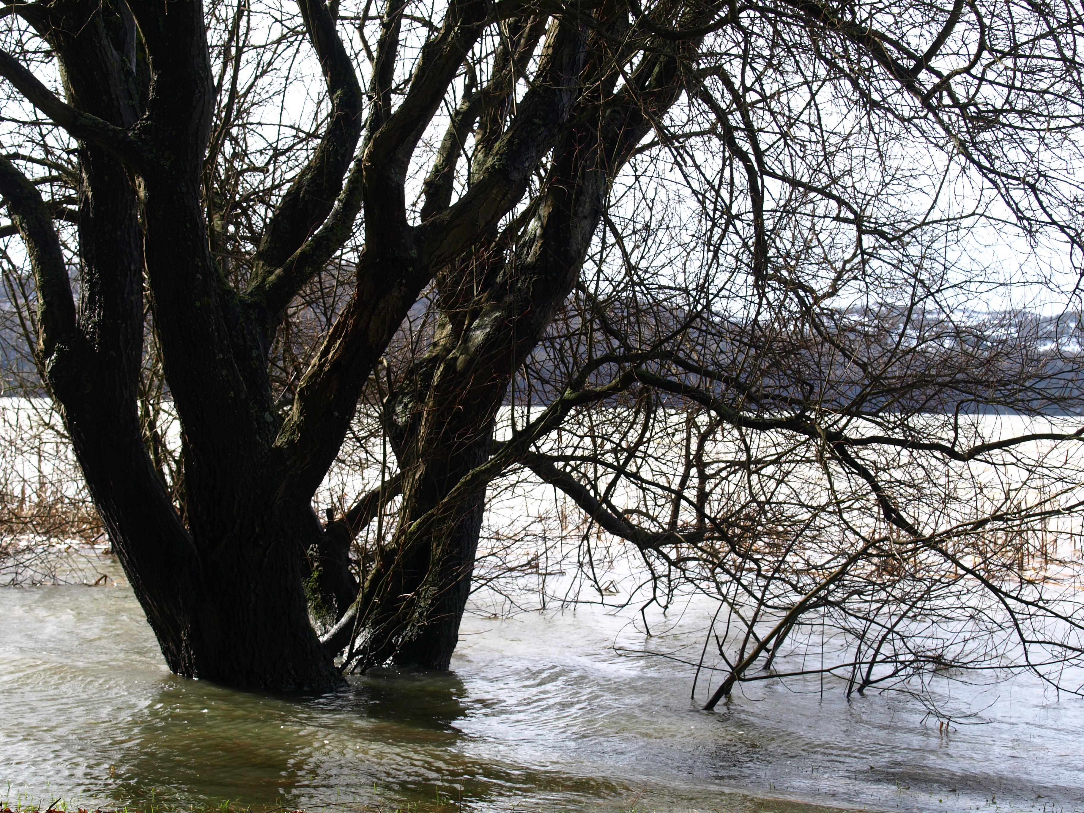 Embalses del sistema del Zadorra Embalse de Urrúnaga 04 This is a photography of a Site of Community Importance in Spain with the ID: ES2110011. Natura2000 entry, EEA entry